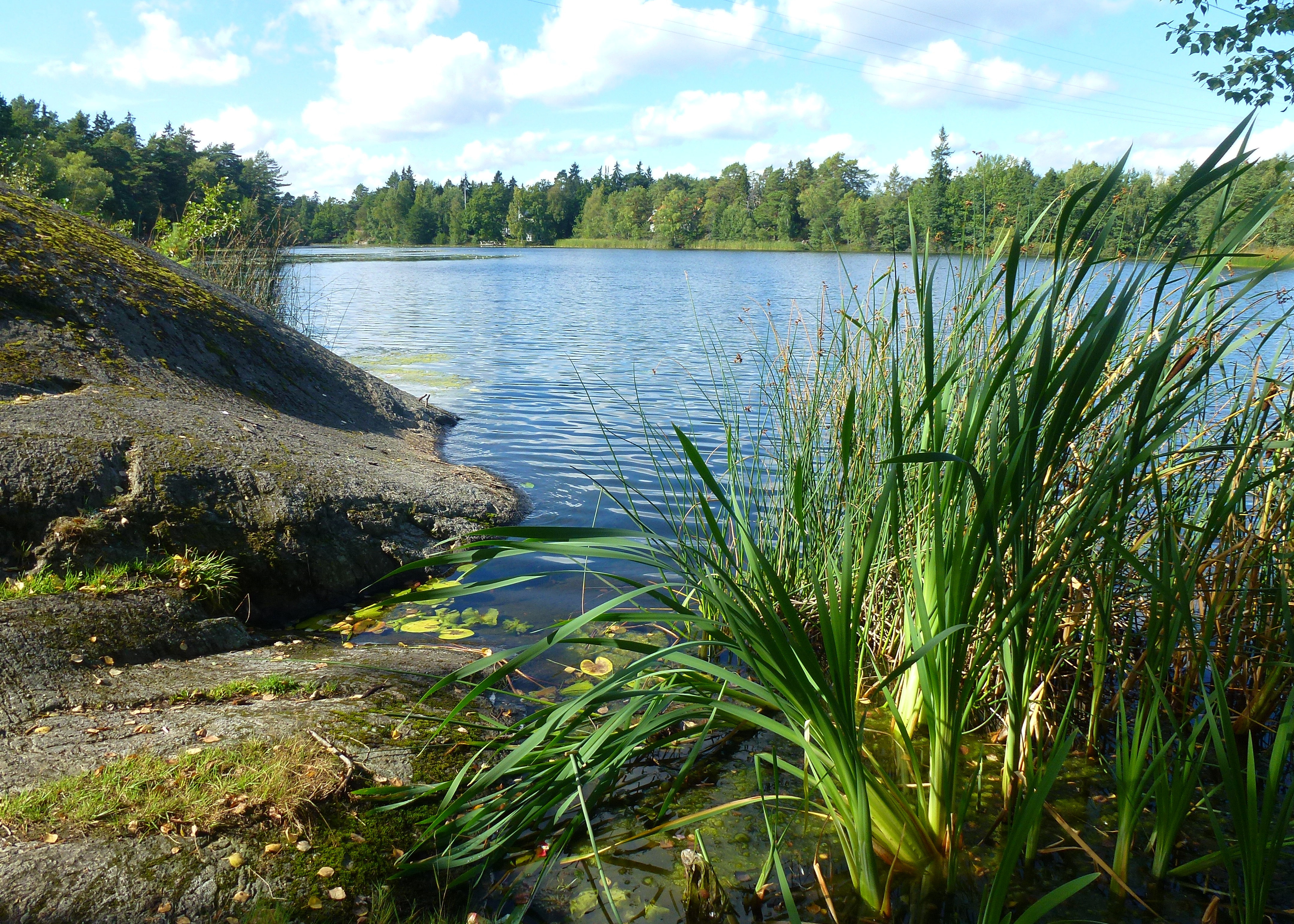 Kocktorpssjön i Tollare Naturreservat